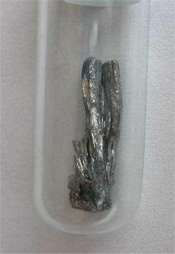 Bildbeschreibung: Thulium Quelle: Foto aus meiner Elementesammlung Fotograf/Zeichner: Tomihahndorf Datum: April 2006